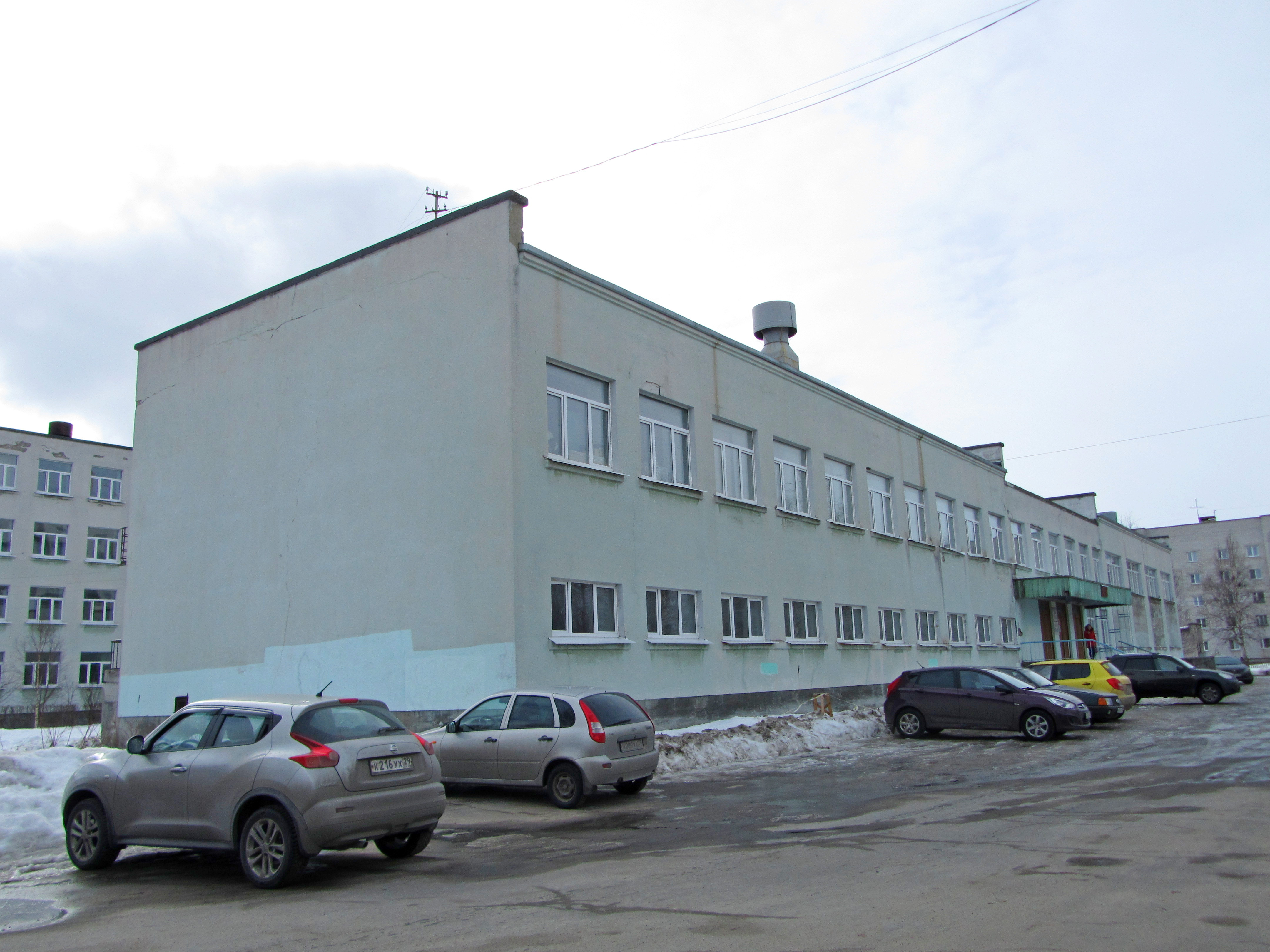 36 дом. Улица Карла Маркса. Северодвинск. Северный (Арктический) Федеральный Университет им. М.В. Ломоносова (САФУ). Фото А. Щекинова